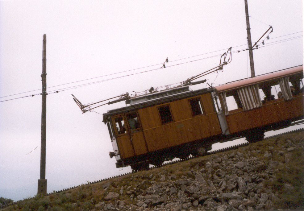 Ozubnicová dráha La Rhune - Francie.